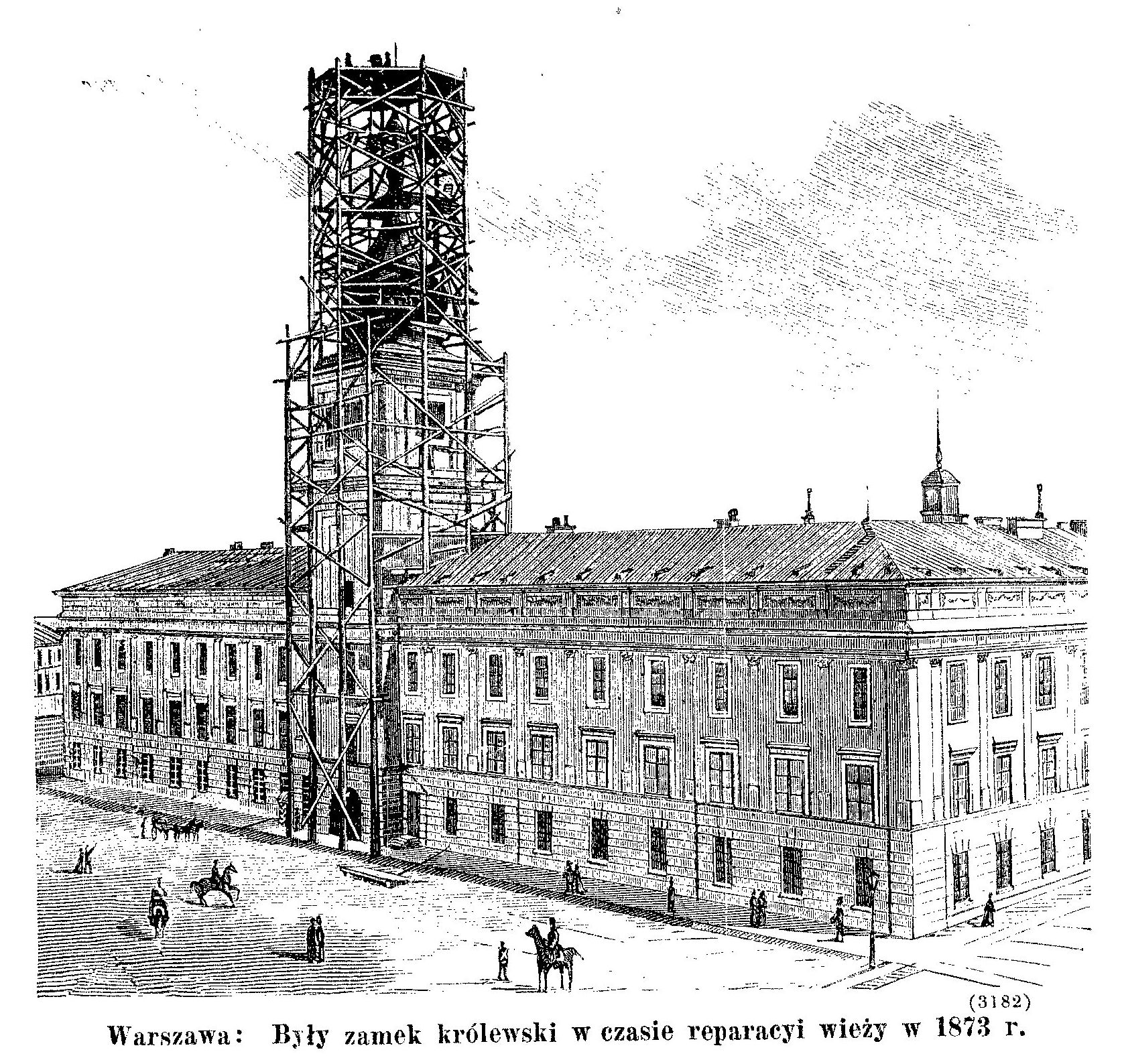 Warszawa: były zamek królewski w czasie reperacji wieży w 1873 roku.